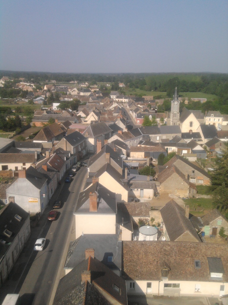 Vue de mézeray, dans la sarthe